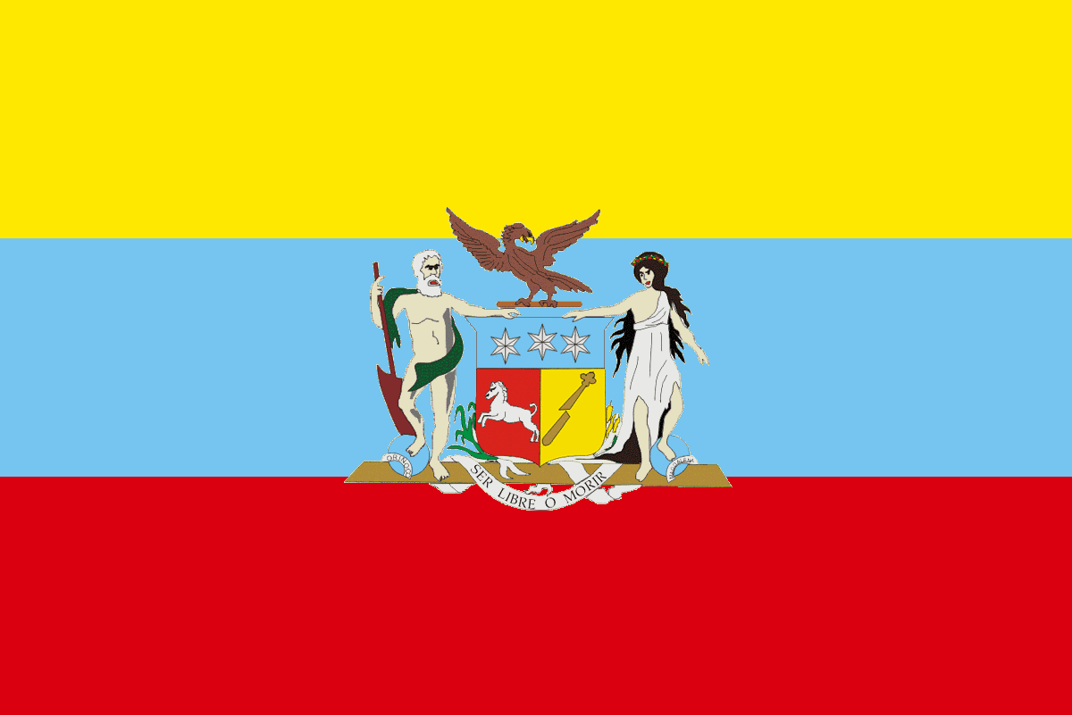 Bandera Gran Colombia 1822